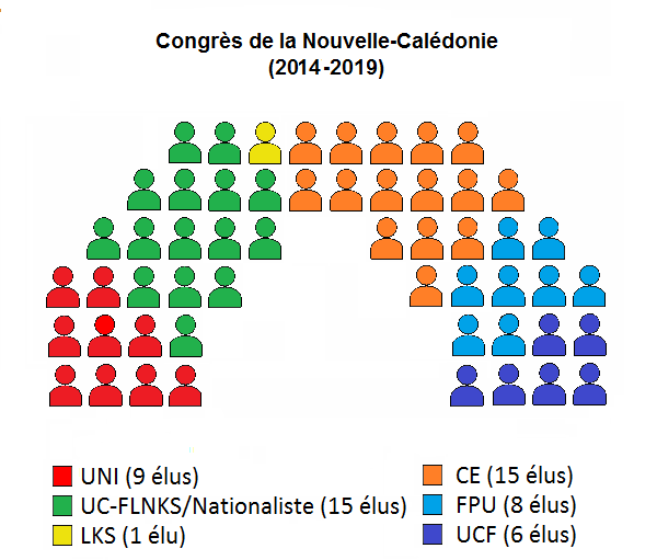 Congrès de la Nouvelle-Calédonie après les élections de 2014 (11 mai).